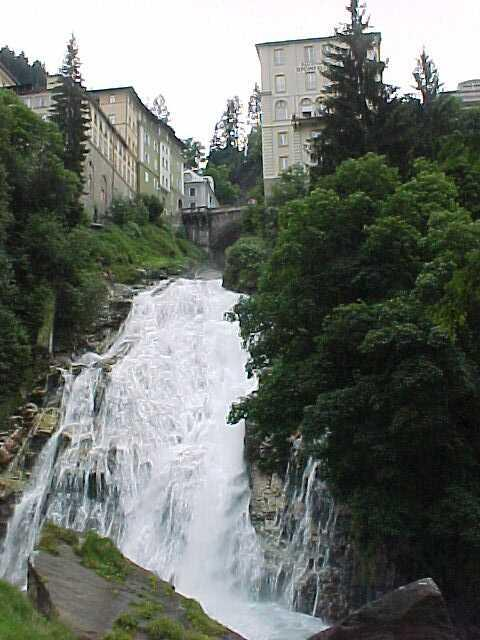 Waterval in Bad Gastein